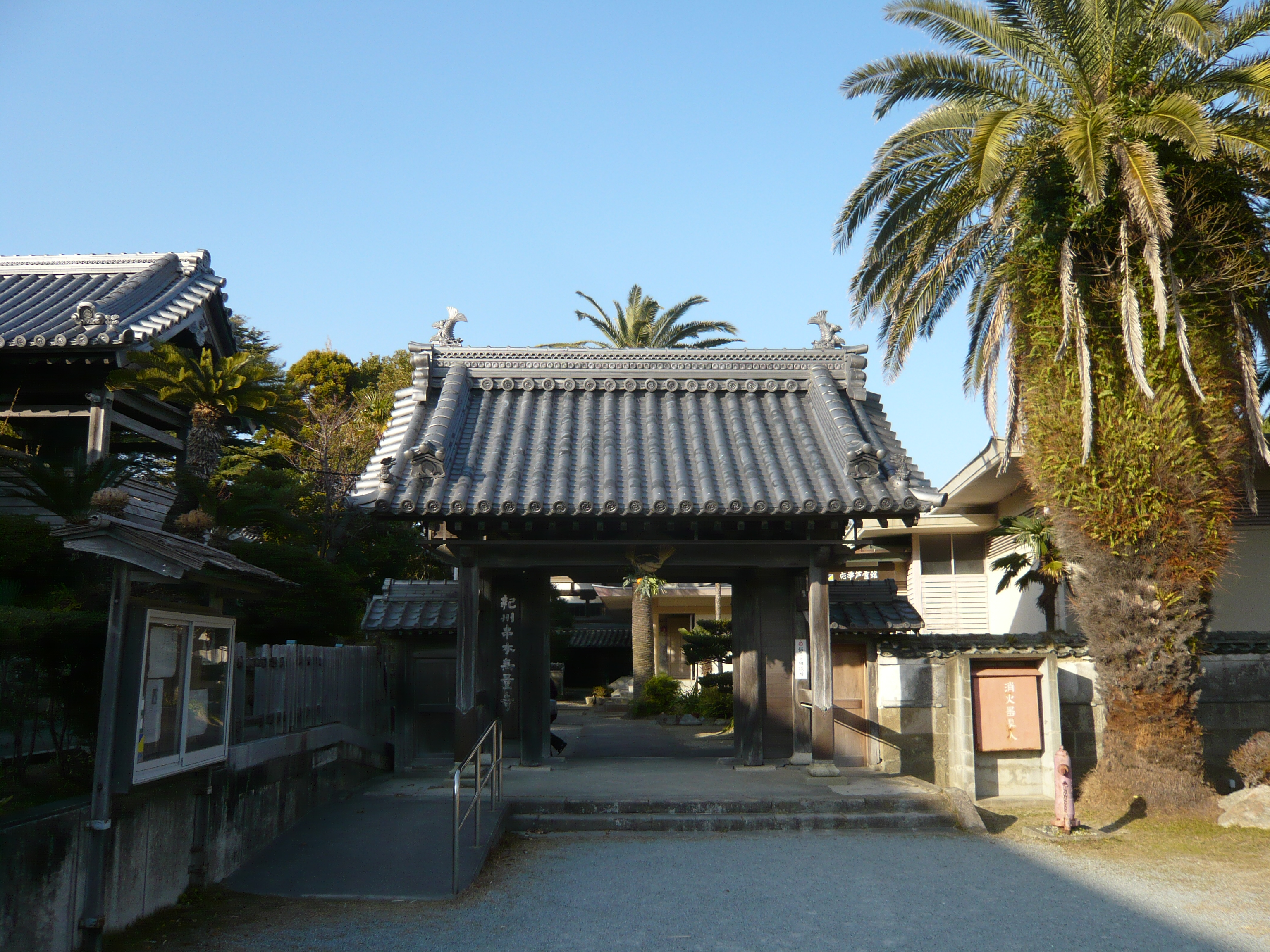 串本応挙芦雪館のある無量寺